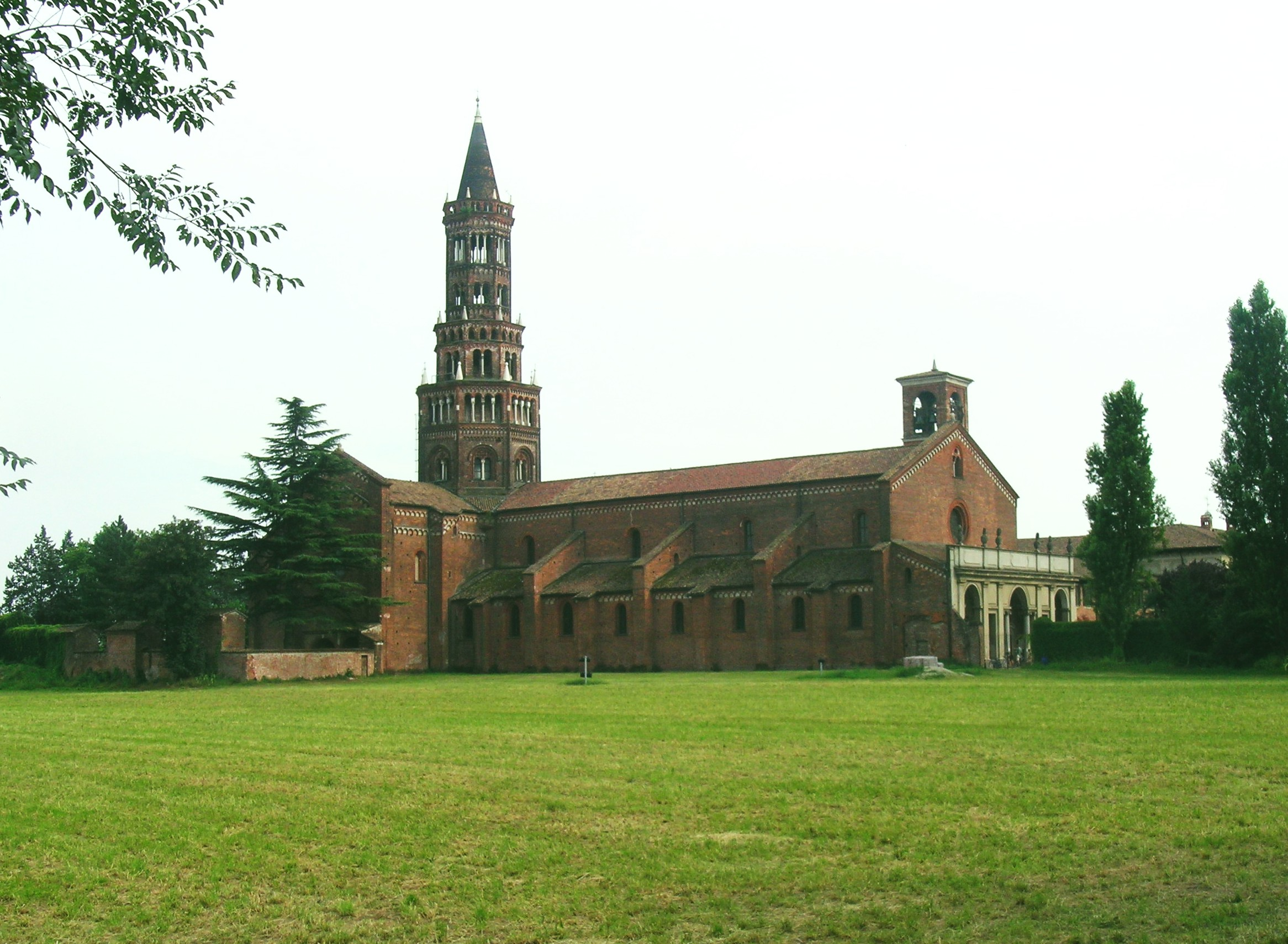 abazia di Chiaravalle